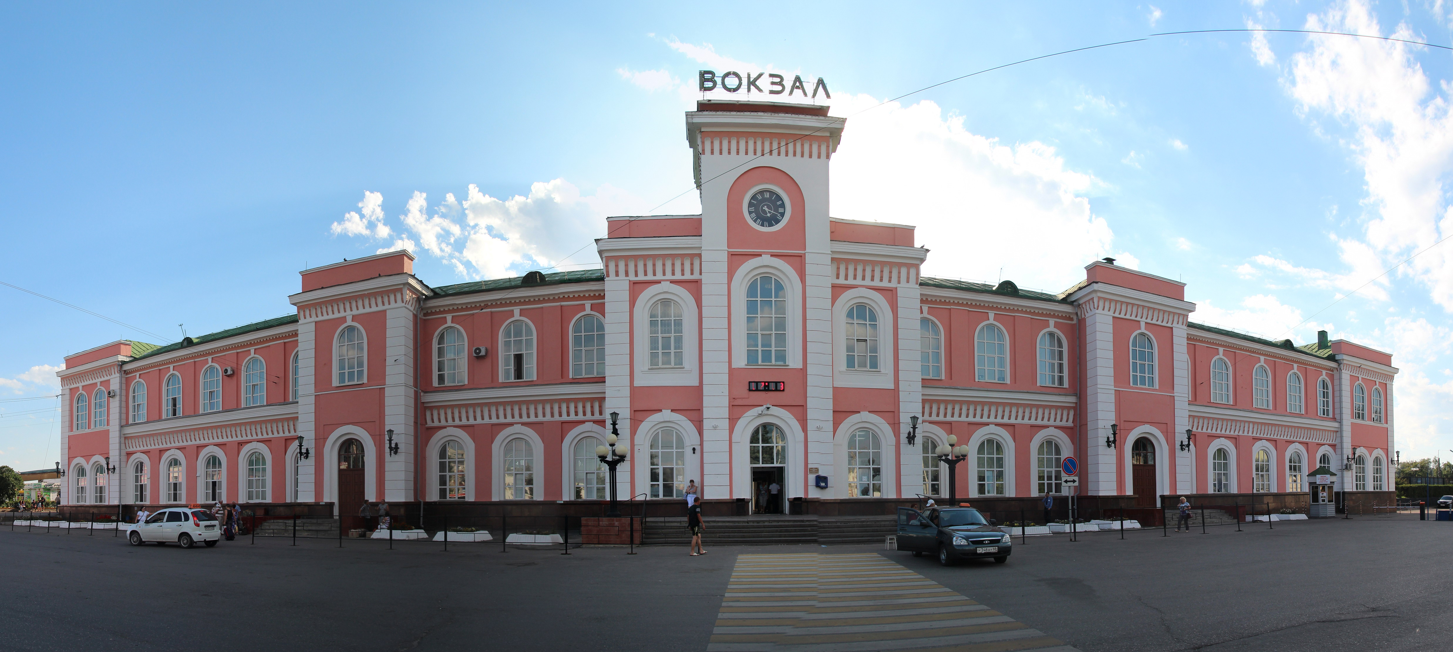 Здание вокзала: Привокзальная площадь, Тамбов, Тамбовская область